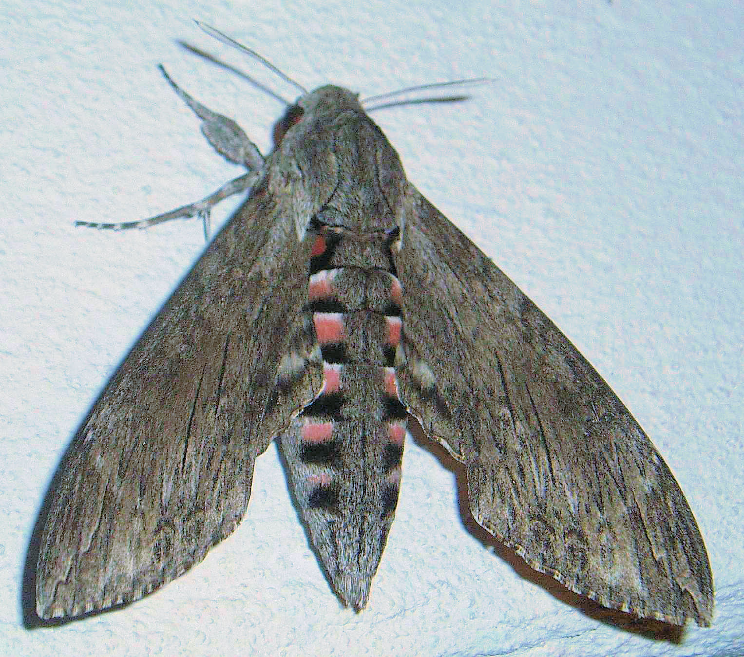 Agrius convolvuli